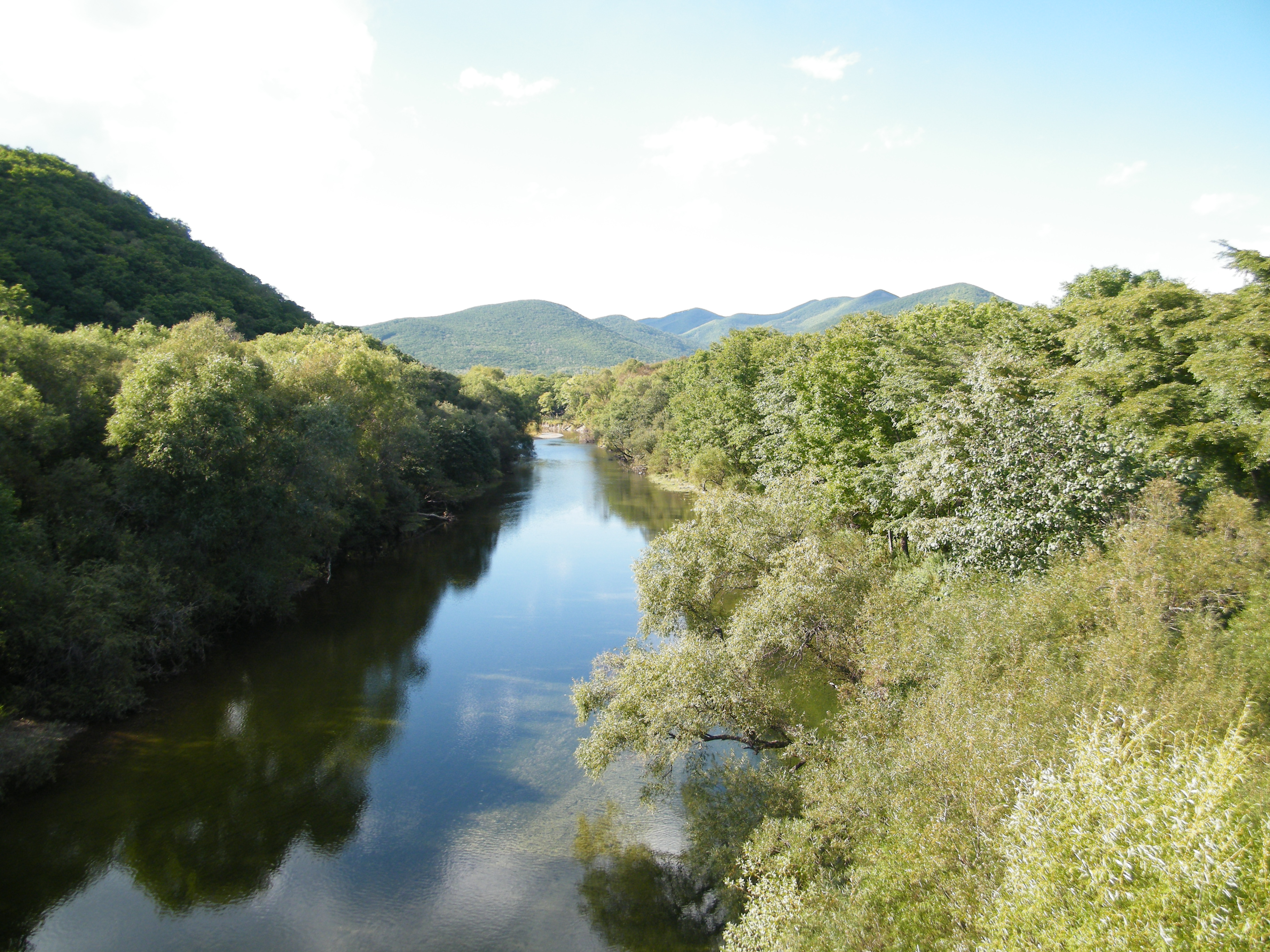 Река Арзамасовка,Ольгинский район